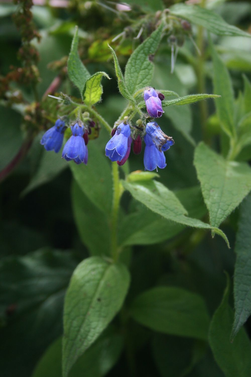 Symphytum asperum, Raublattgewächse (Boraginaceae) – Georgien/საქართველო: Kleiner Kaukasus, an der Straße zum Tskhratskaro-Pass, ca. 4,9 km SSW Bakuriani/ბაკურიანი, ca. 2070 m s.m.